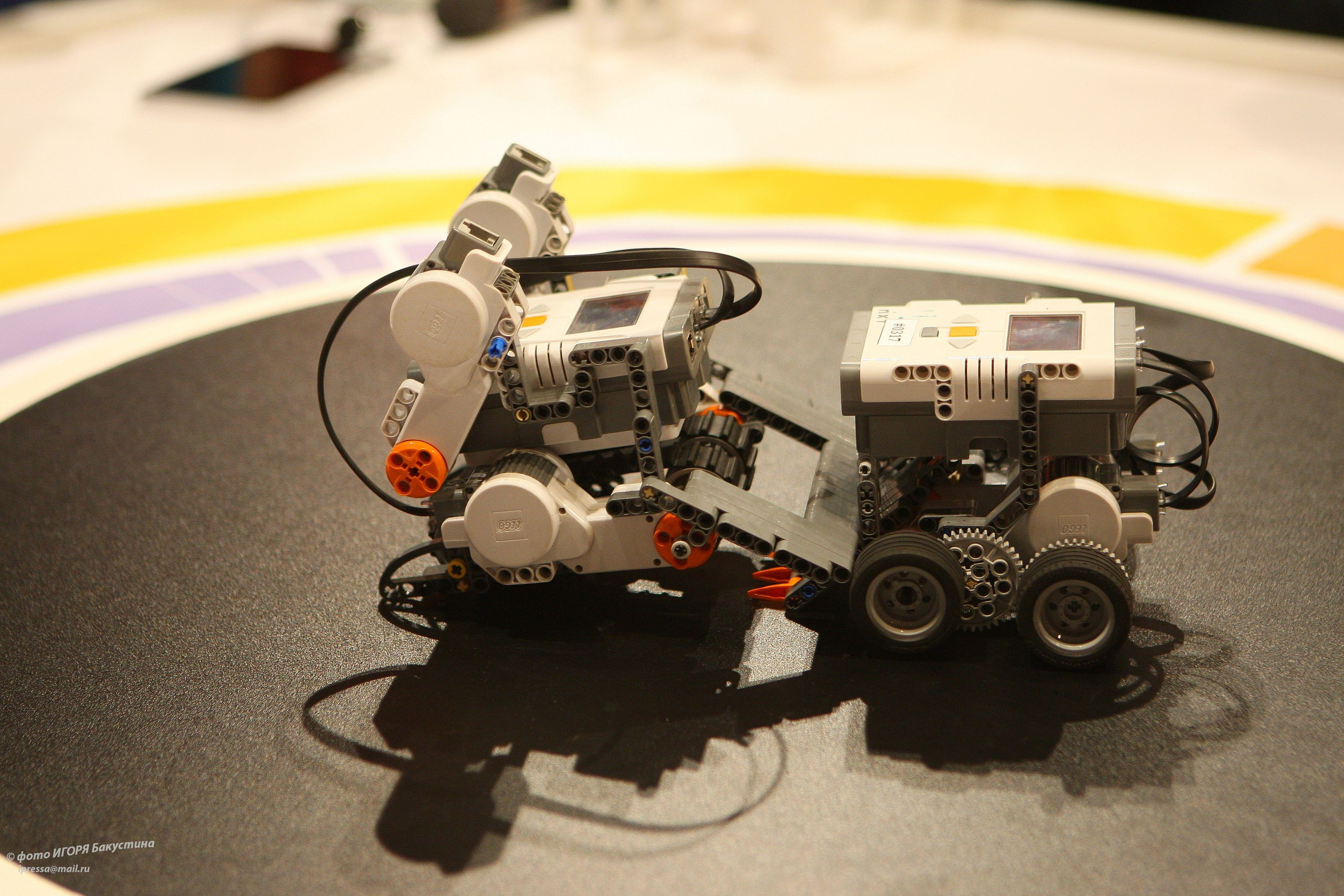 Лаборатория роботохеники